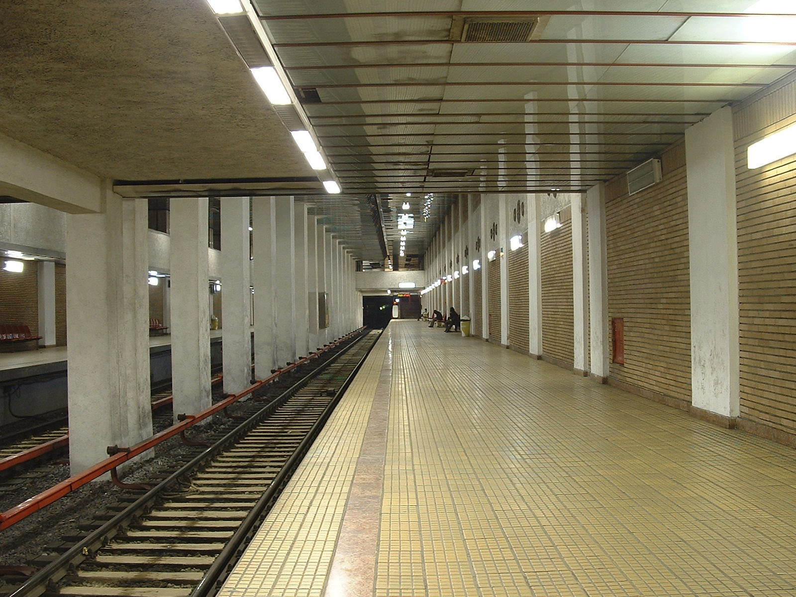 poza afisata nu este statia timpuri noi si este semanatoarea